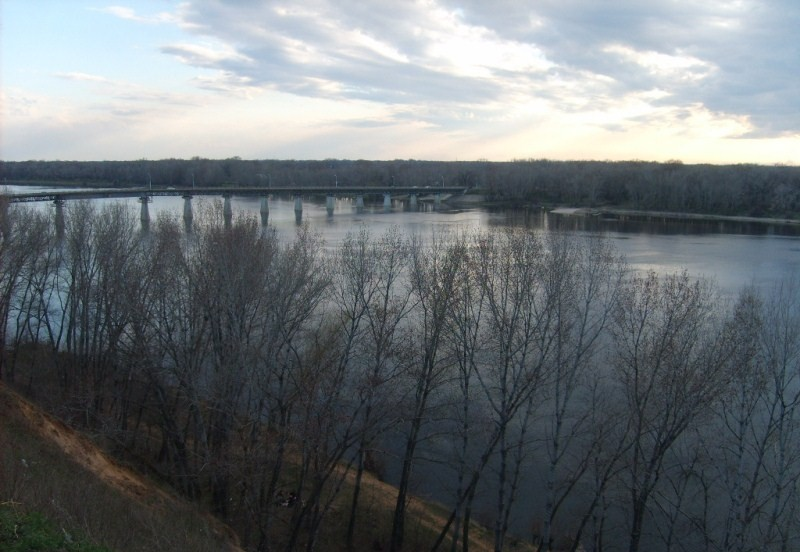 Ахтуба